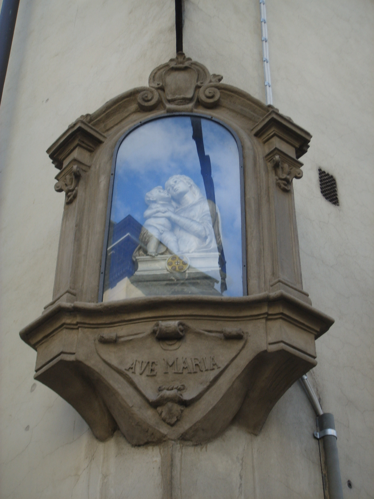 Tabernacolo della madonna col bambino, andrea della robbia (via della scala-via orti oricellari)